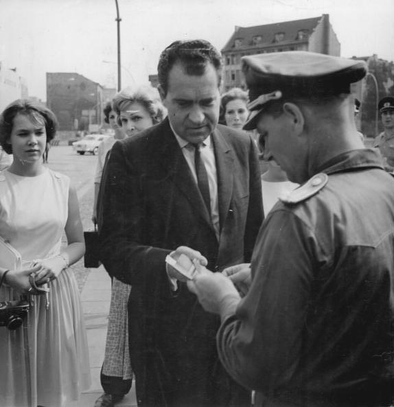 Zentralbild Heilig 24.7.1963 Nixon besuchte die DDR-Hauptstadt Im Juli 1963 besuchte Richard Nixon, ehemaliger Vizepräsident und Präsident der USA seit Januar 1969 die Hauptstadt der DDR, Berlin. UBz. Nixon zeigt einem Offizier der Nationalen Volksarmee der DDR am Grenzübergang Friedrichstraße seine Ausweispapiere.